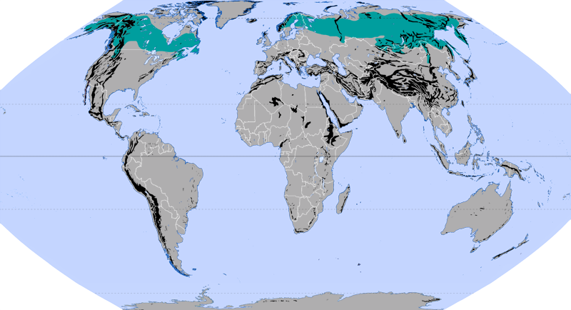 Auszug der Karte Ökozonen nach Jürgen Schultz